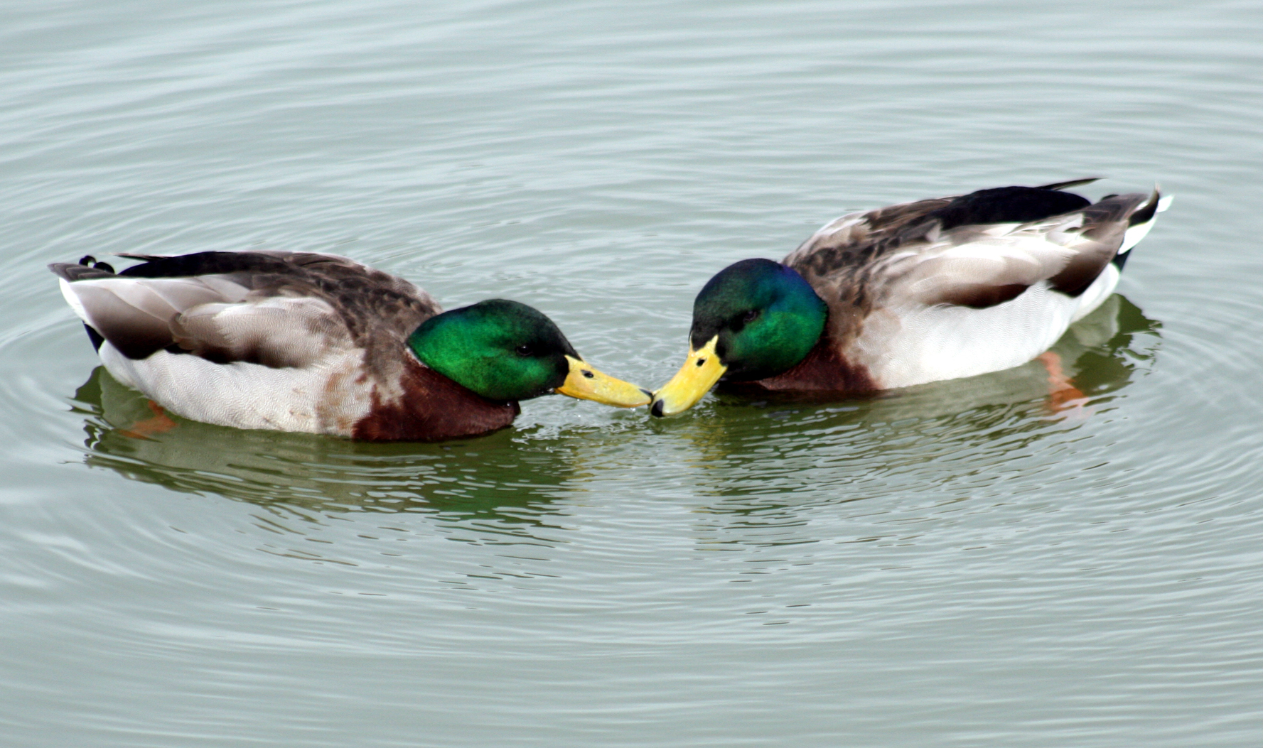 Males Anas platyrhynchos (Mallard)